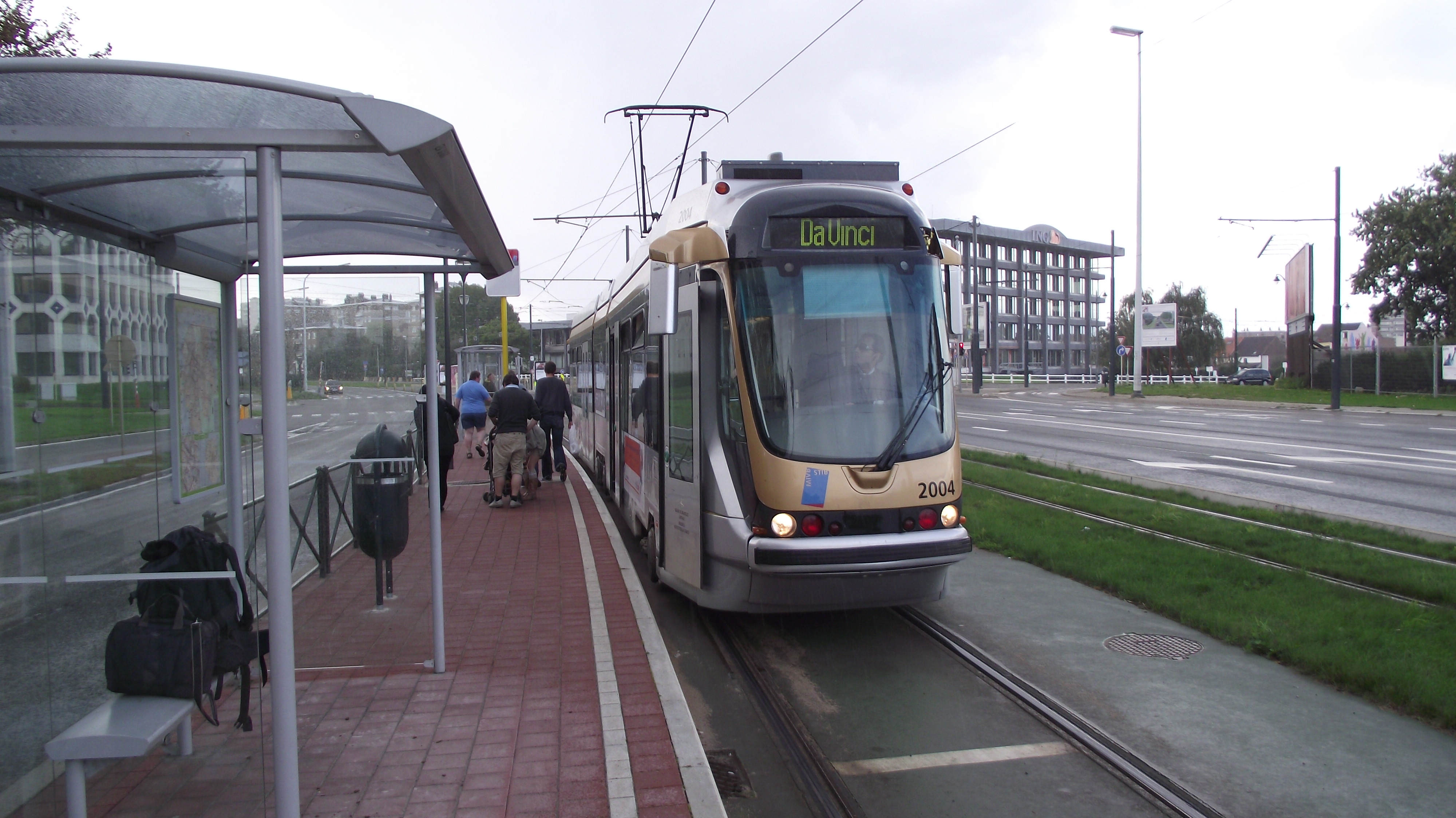 Aankomende tram op het Da Vinci eindpunt van tramlijn 62